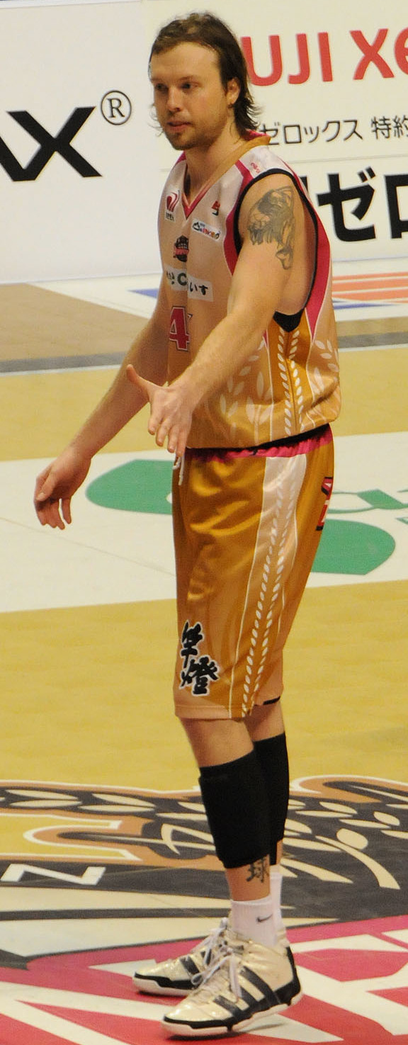 秋田ノーザンハピネッツ、ポール・ビュートラック選手。秋田市立体育館で。